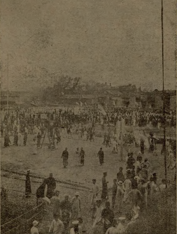 五月七日爱国表示在上海西门公共体育场摄影(第一图)(中英文对照):[照片] 《英语周刊》1919 年